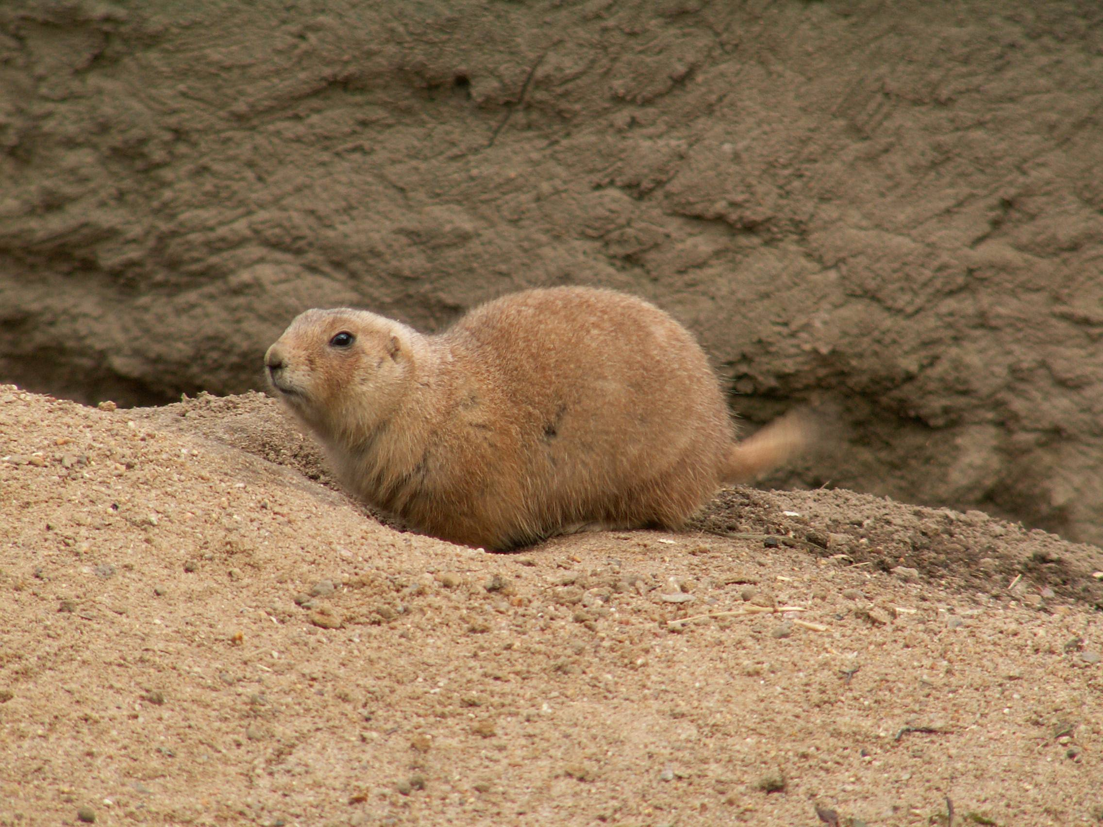 Cynomys, Präriehund, aufgenommen in Hagenbecks Tierpark, Hamburg, Deutschland.